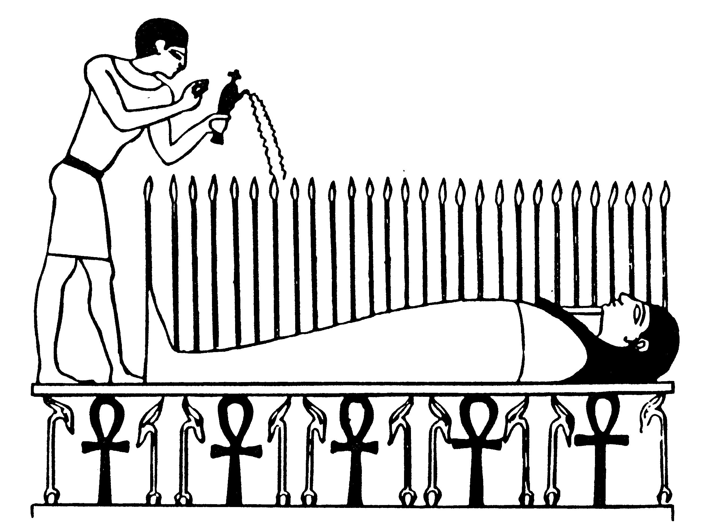 Osiris_Philae.jpg